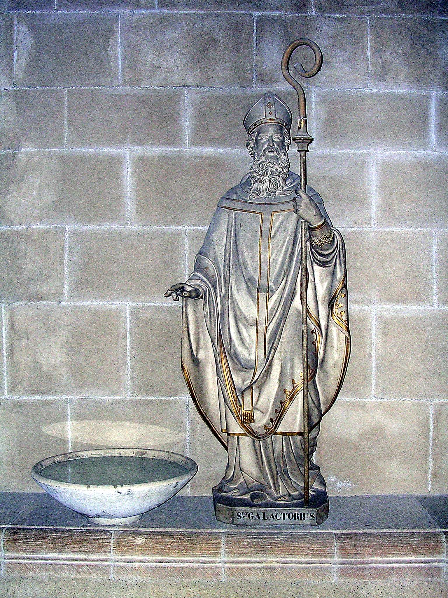 Statue de Saint Galactoire (Galactorius) dans l'ancienne cathédrale de Lescar, dans le départment français des Pyrénées-Atlantiques